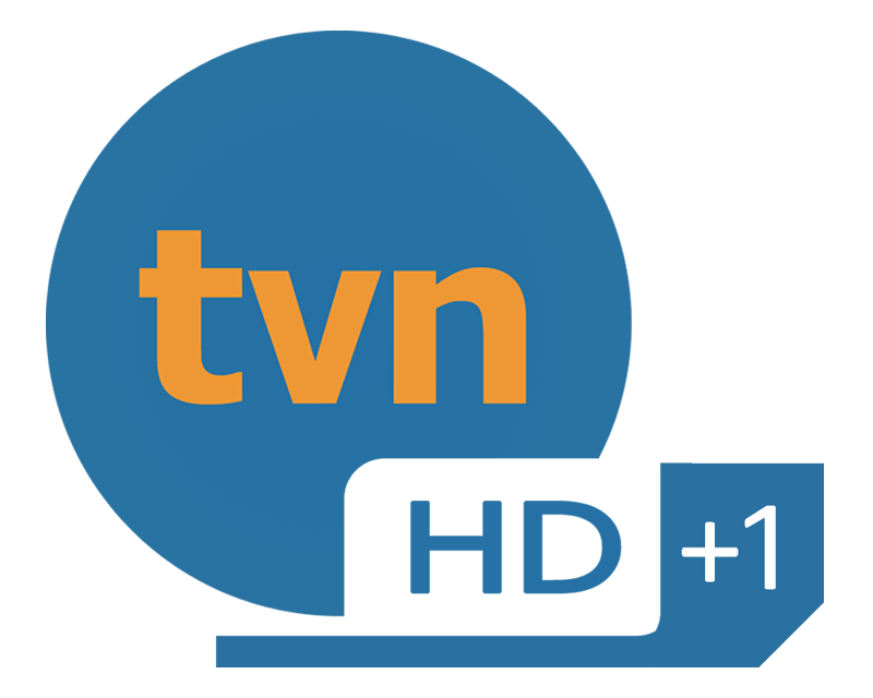 Logo von TVN HD+1 vom Junei 2011 de July 2011